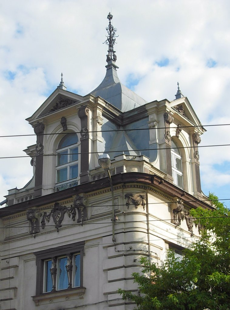 Willa Carla Blumwe w Fabryce Obrabiarek do Drewna - ul. Nakielska 53 w Bydgoszczy